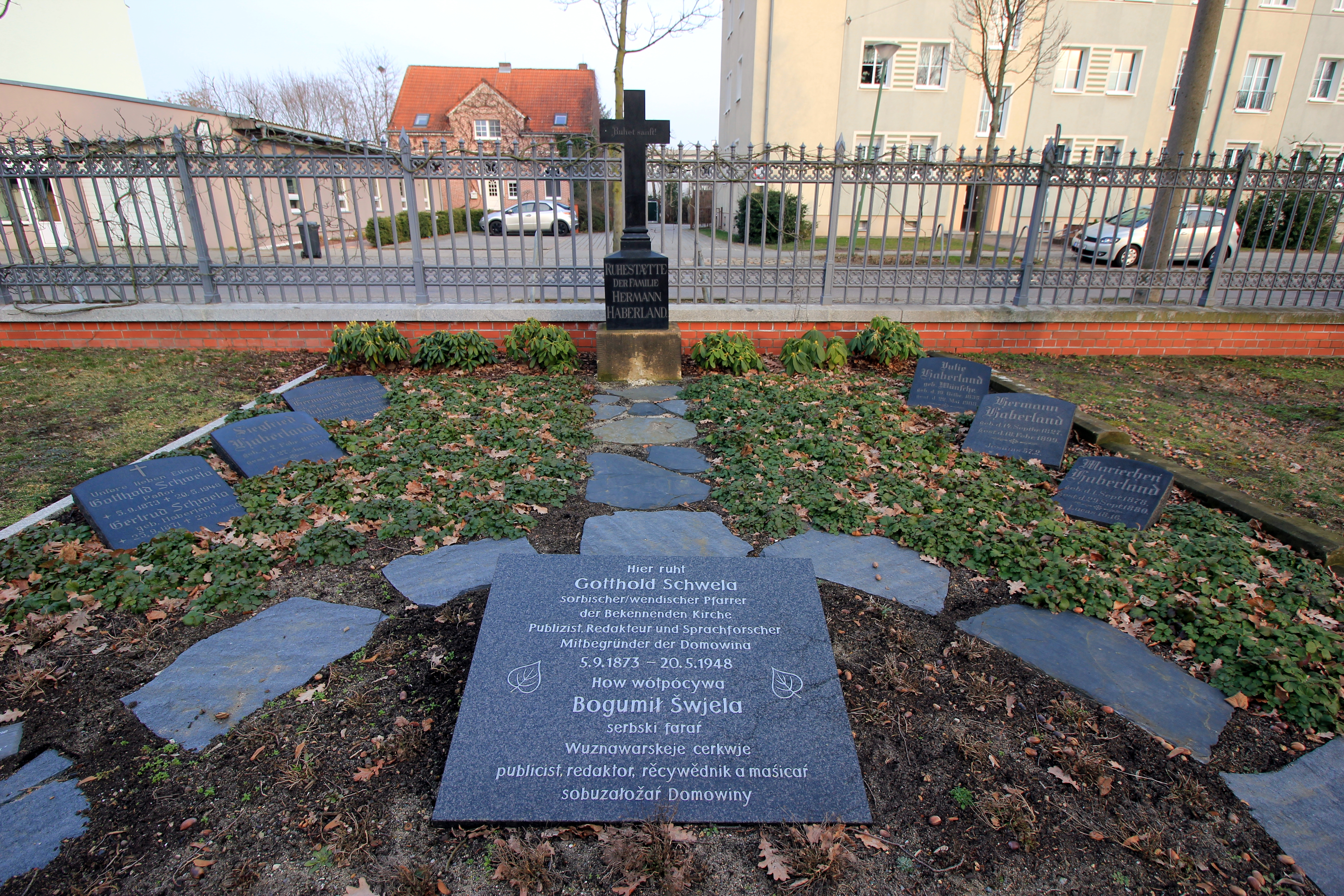 Hornjoserbsce: Row Bogumiła Šwjele na Sewjernym kěrchowje w Choćebuzu. Dolnoserbski: Row Bogumiła Šwjele na Pódpołnocnem kjarchobje w Chóśebuzu.